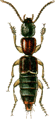 This file has been extracted from another file: Jacobs14.jpg